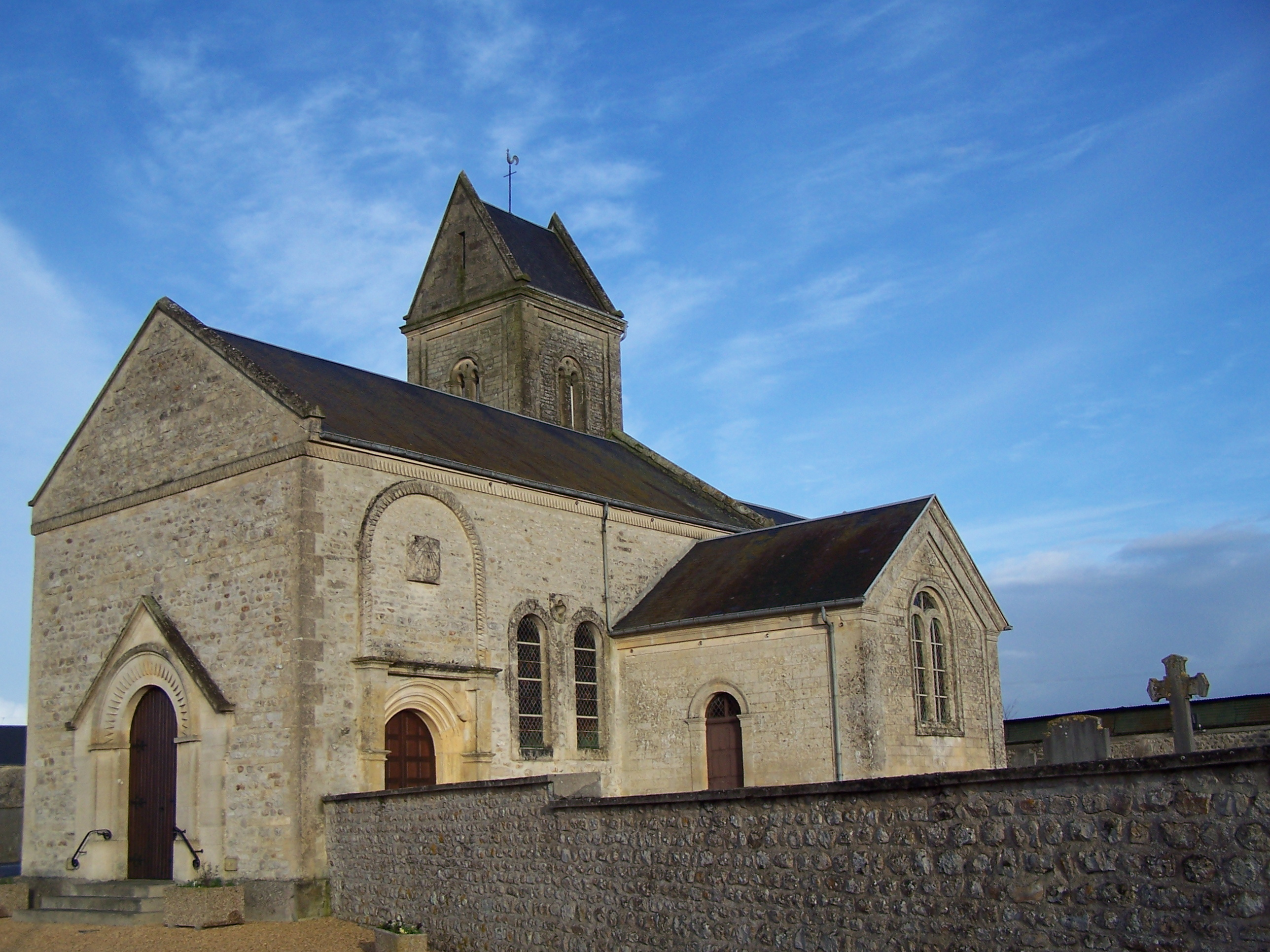 Eglise Saint-Jean-Baptiste de Fresney-le-Vieux (Calvados)